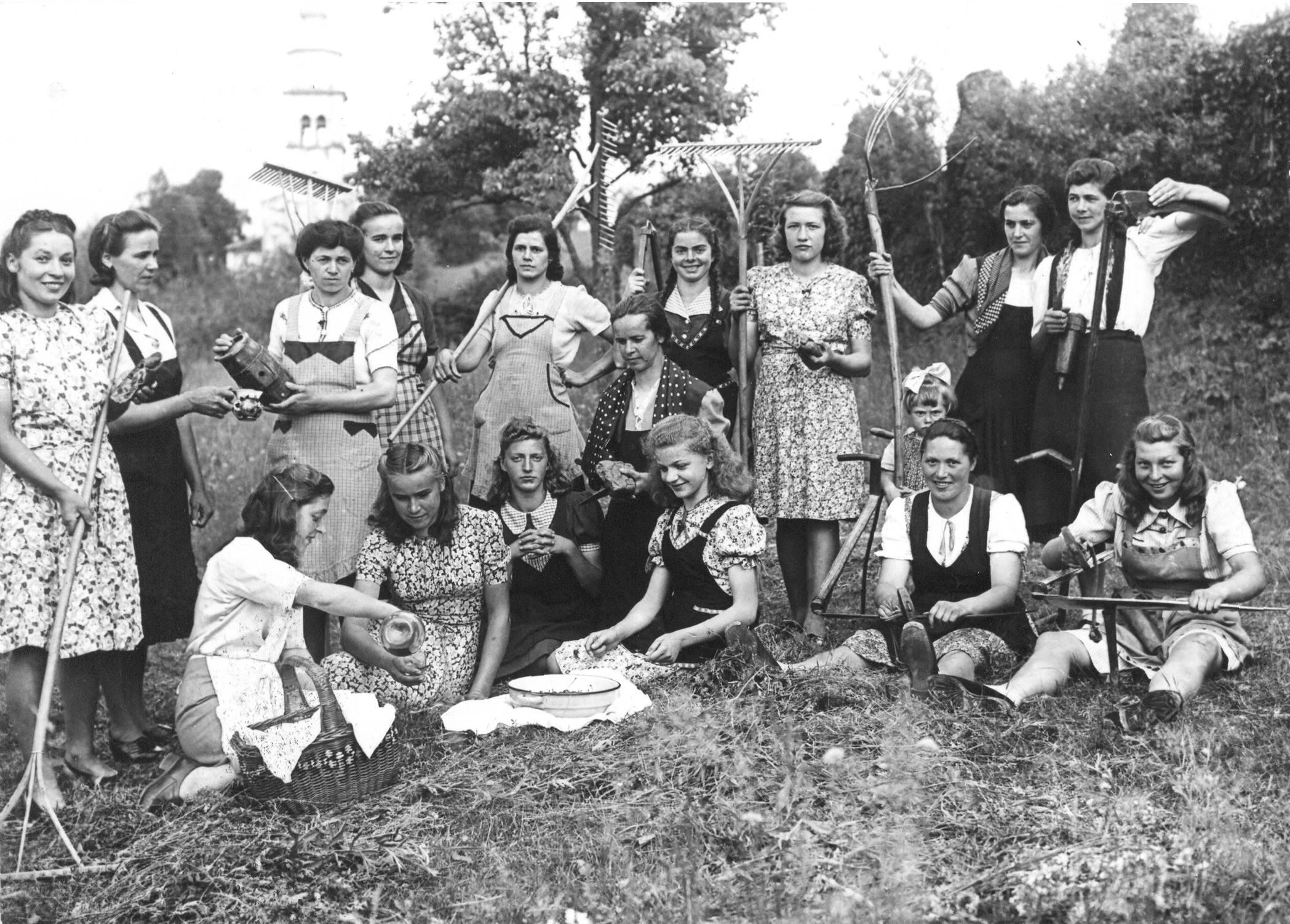 Ženska četa, organizirana s strani Osvobodilne fronte, med delom na polju.